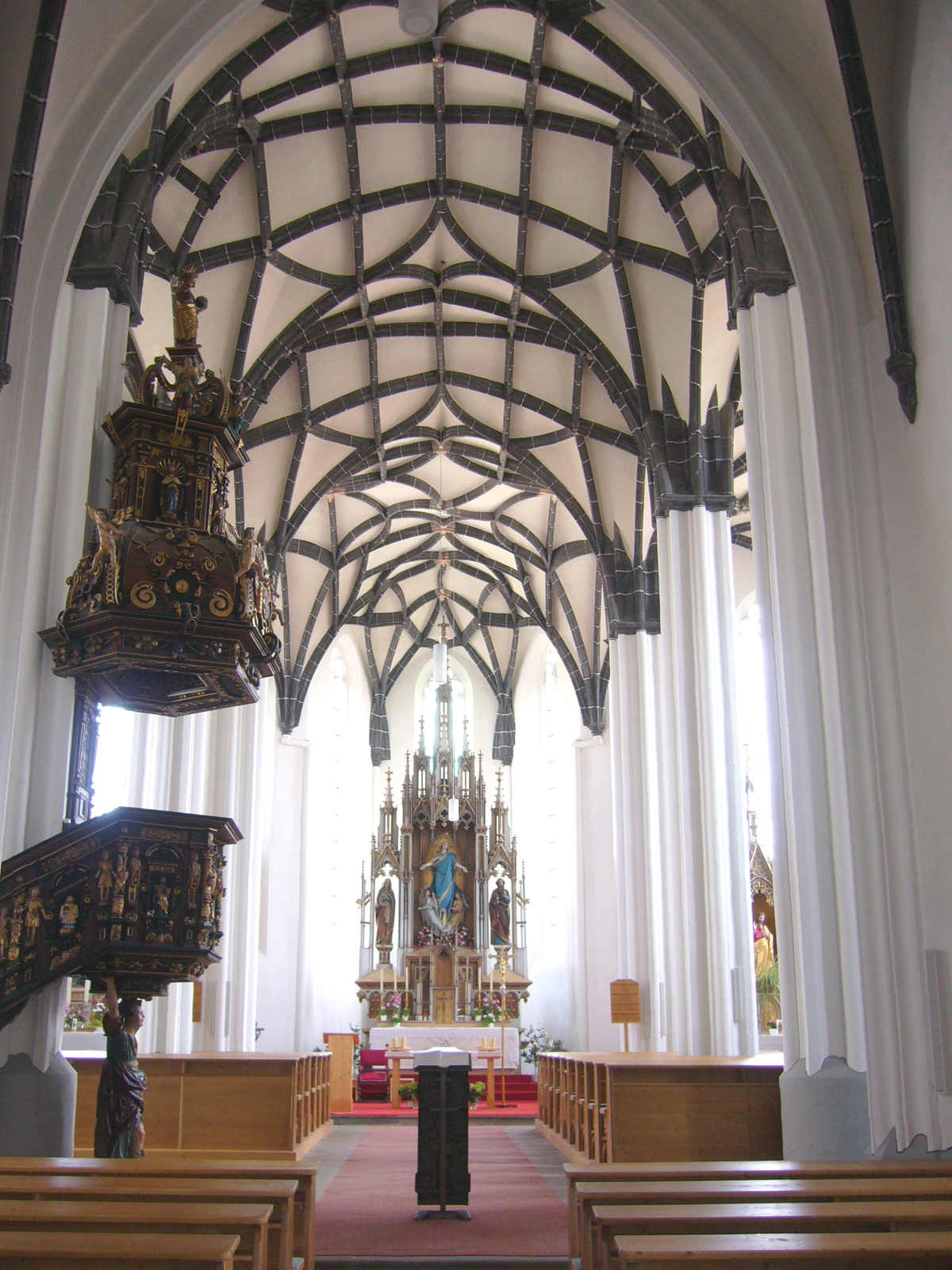 Kirche von Krenstetten innen